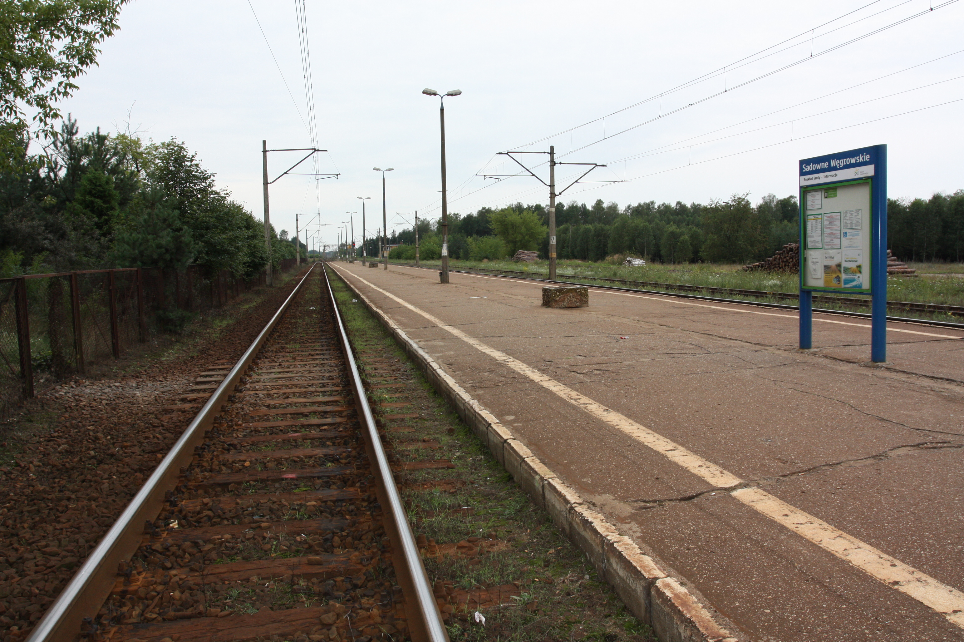 Peron na stacji kolejowej Sadowne Węgrowskie